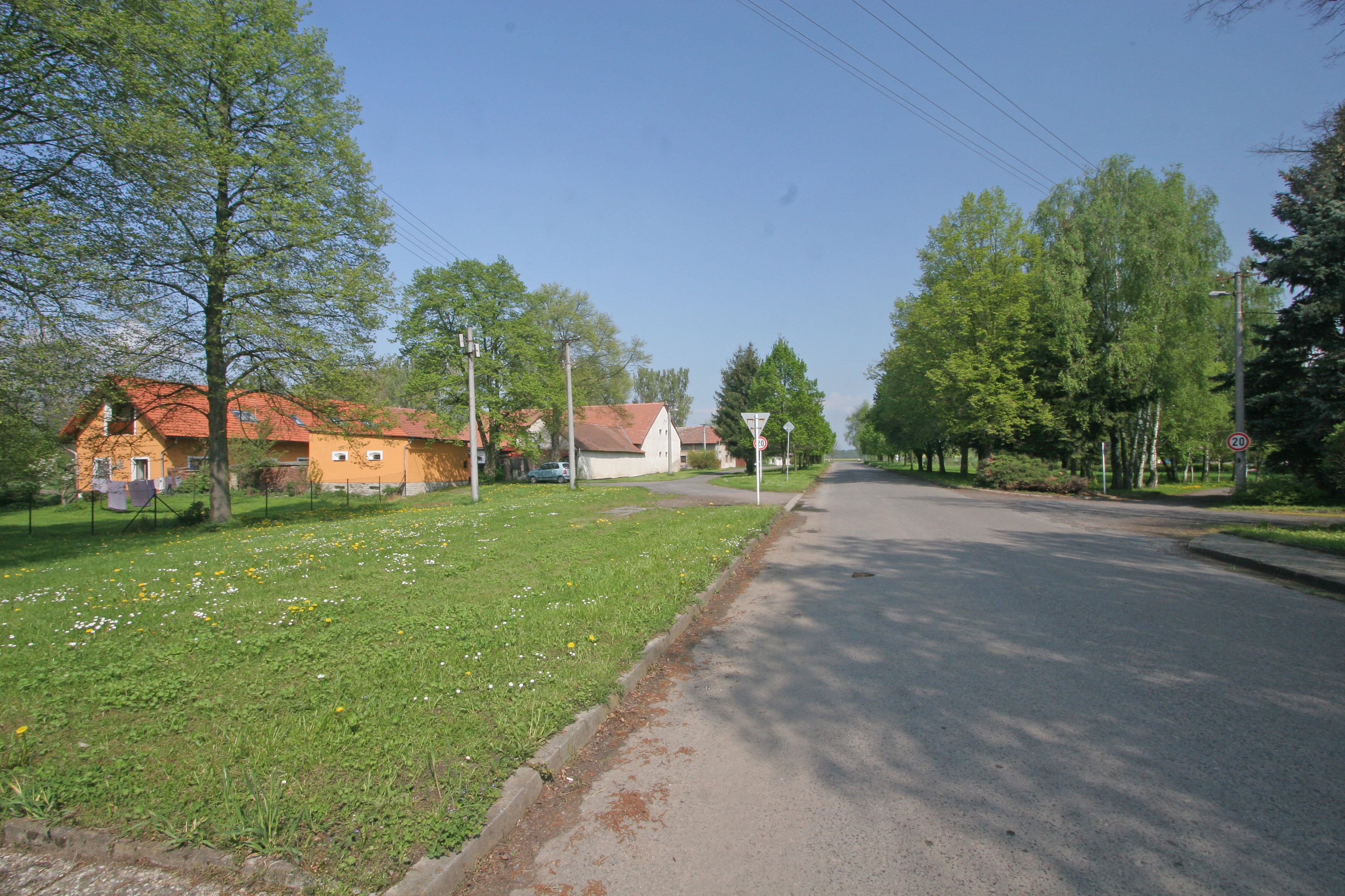 Lány u Dašic náves